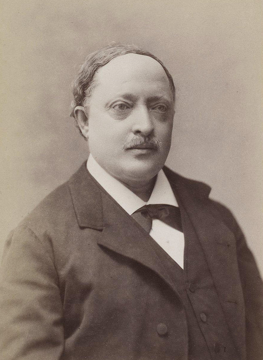 Joseph Halévy